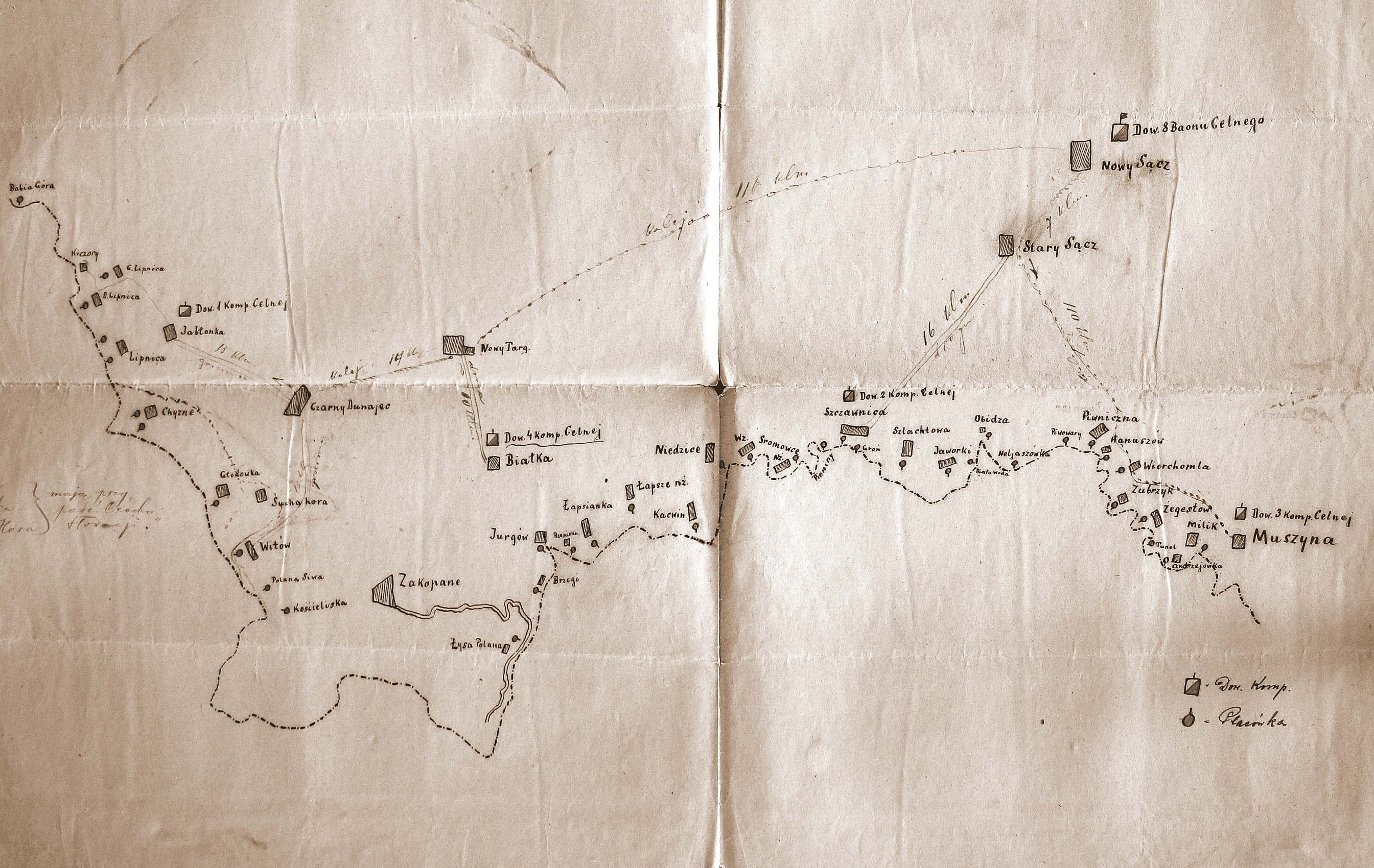 Szkic rozmieszzczenia 8 batalionu celnego Nowy Targ